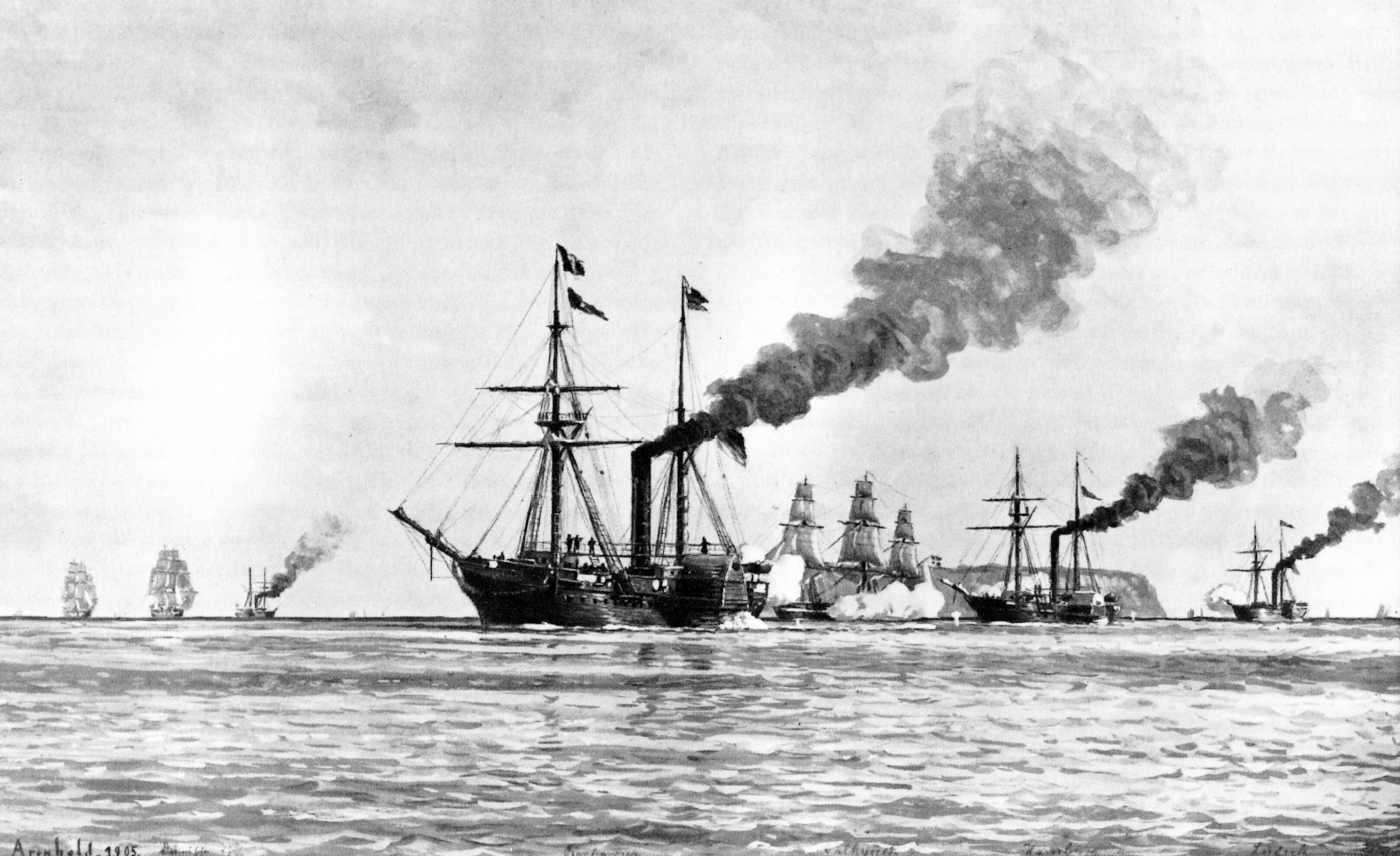 Seegefecht vor Helgoland 1849 zwischen Einheiten der dänischen Flotte und der Reichsflotte. Vorn die drei deutschen Schiffe; zwischen ihnen die dänische Korvette Valkyrien. Links kommen die dänische Radkorvette Gejser und zwei weitere Fregatten hinzu. Gemälde von Lüder Arenhold (1854-1915) um 1905